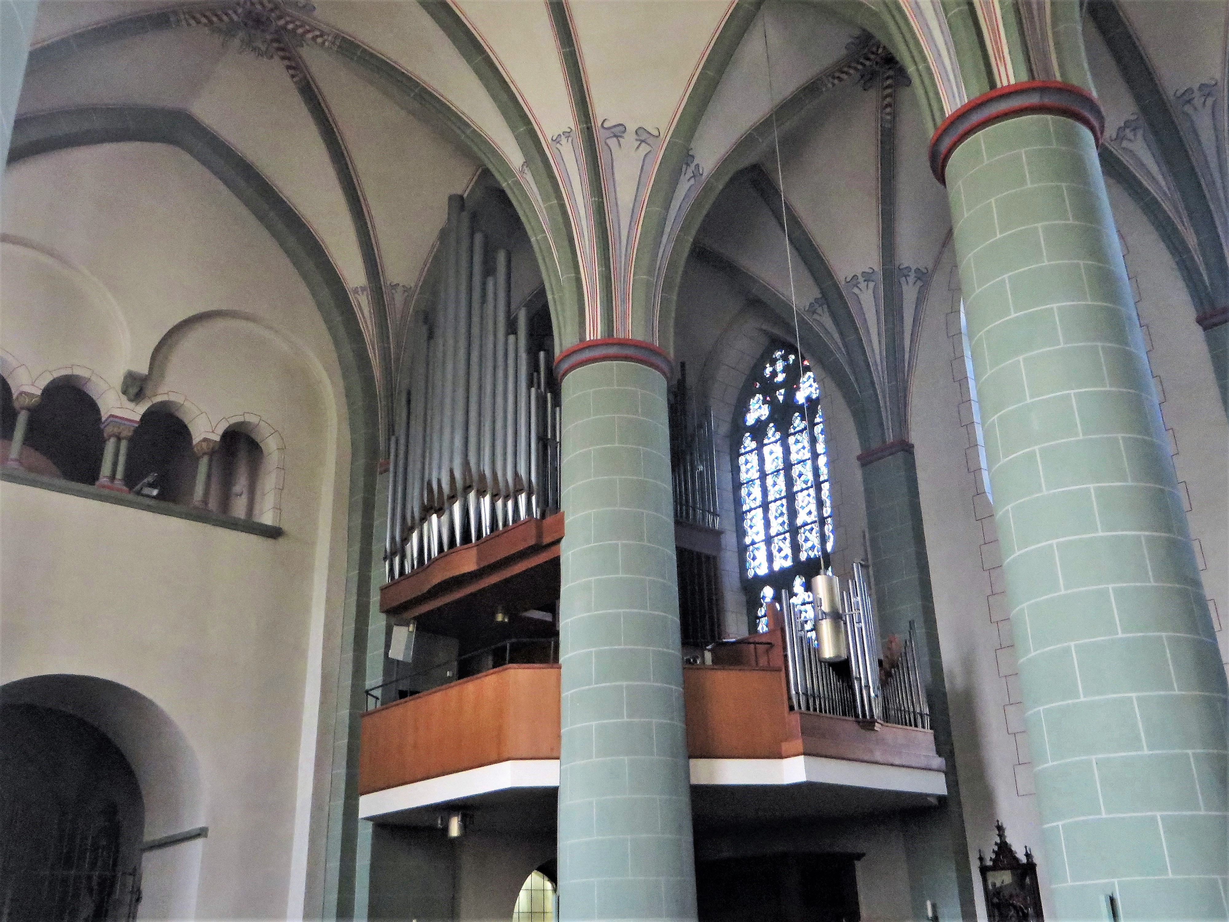 Katholische Pfarrkirche St. Johannes Baptist in Attendorn. Blick auf die Orgelempore, Seitenansicht.